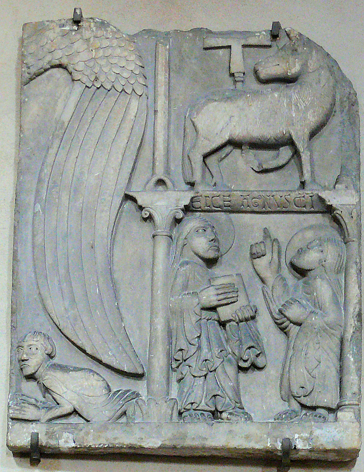 Cathédrale Saint-Jean-Baptiste de Saint-Jean-de-Maurienne - Vestige de la porte sud de la cathédrale romane déposé dans le cloître.